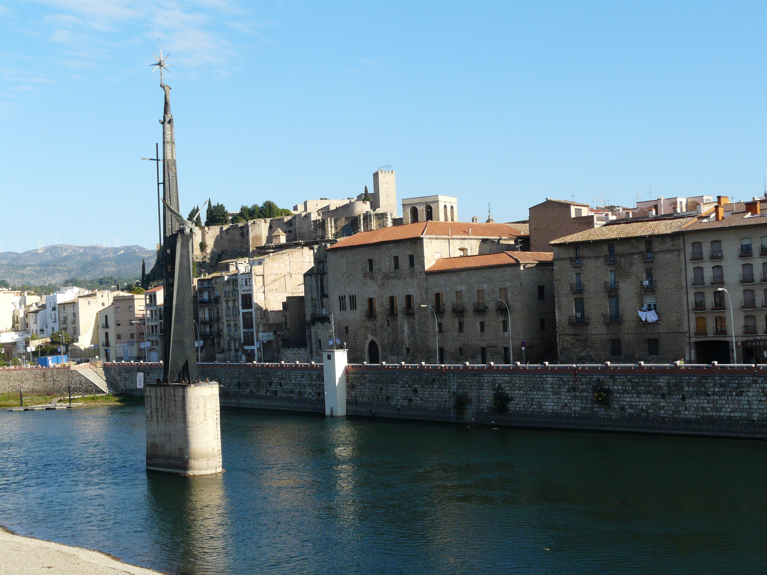 Monument commemoratiu de la Batalla de l'Ebre (Tortosa) Object location40° 48′ 50.31″ N, 0° 31′ 13.26″ E